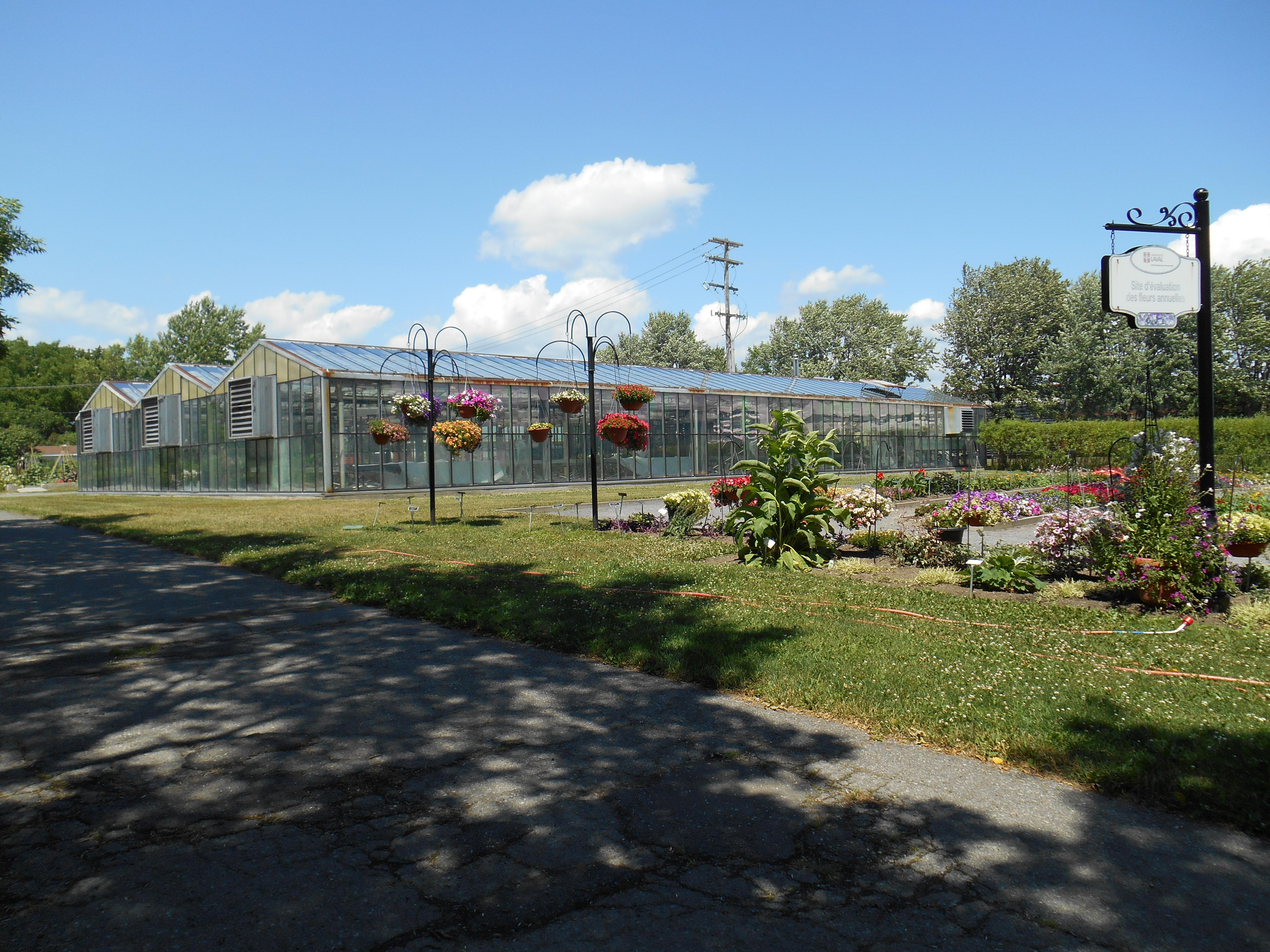 Jardin botanique Roger-Van den Hende, Ville de Québec, Canada